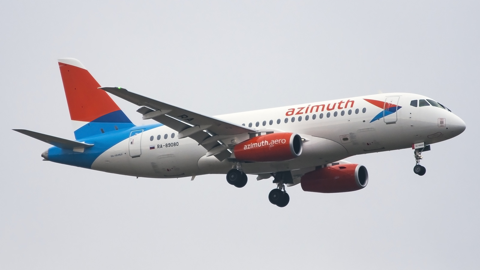 RA-89080 Sukhoi SuperJet 100-95LR Azimuth VKO | UUWW